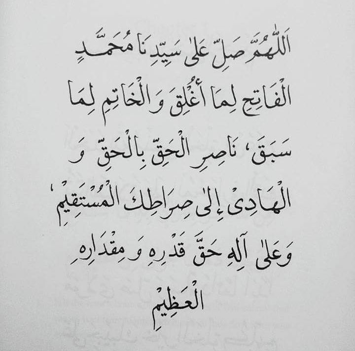 La Salat Al Fatihi.